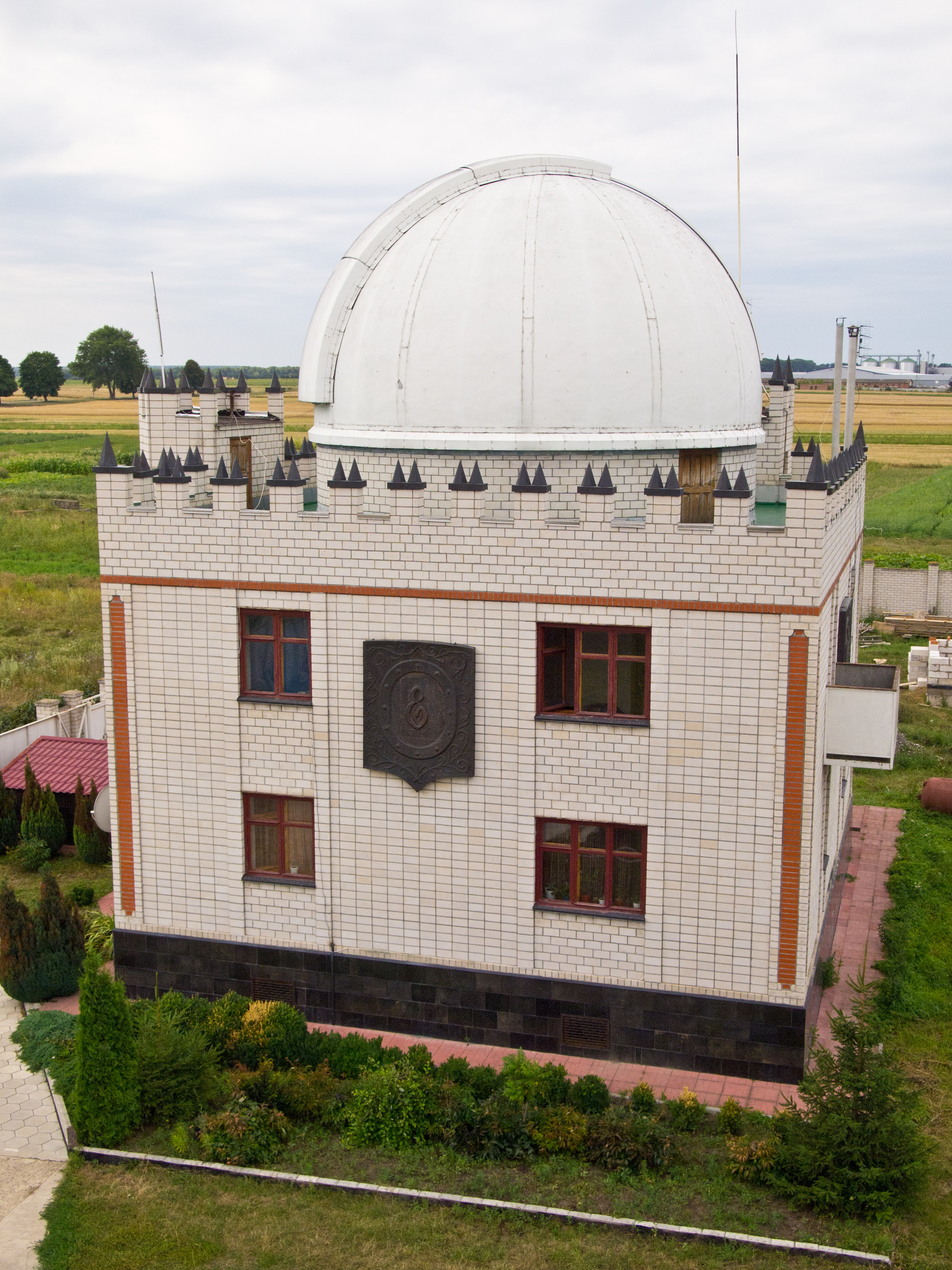 Андрушівська астрономічна обсерваторія, перший павільйон, вид з південної вежі другого павільйону.